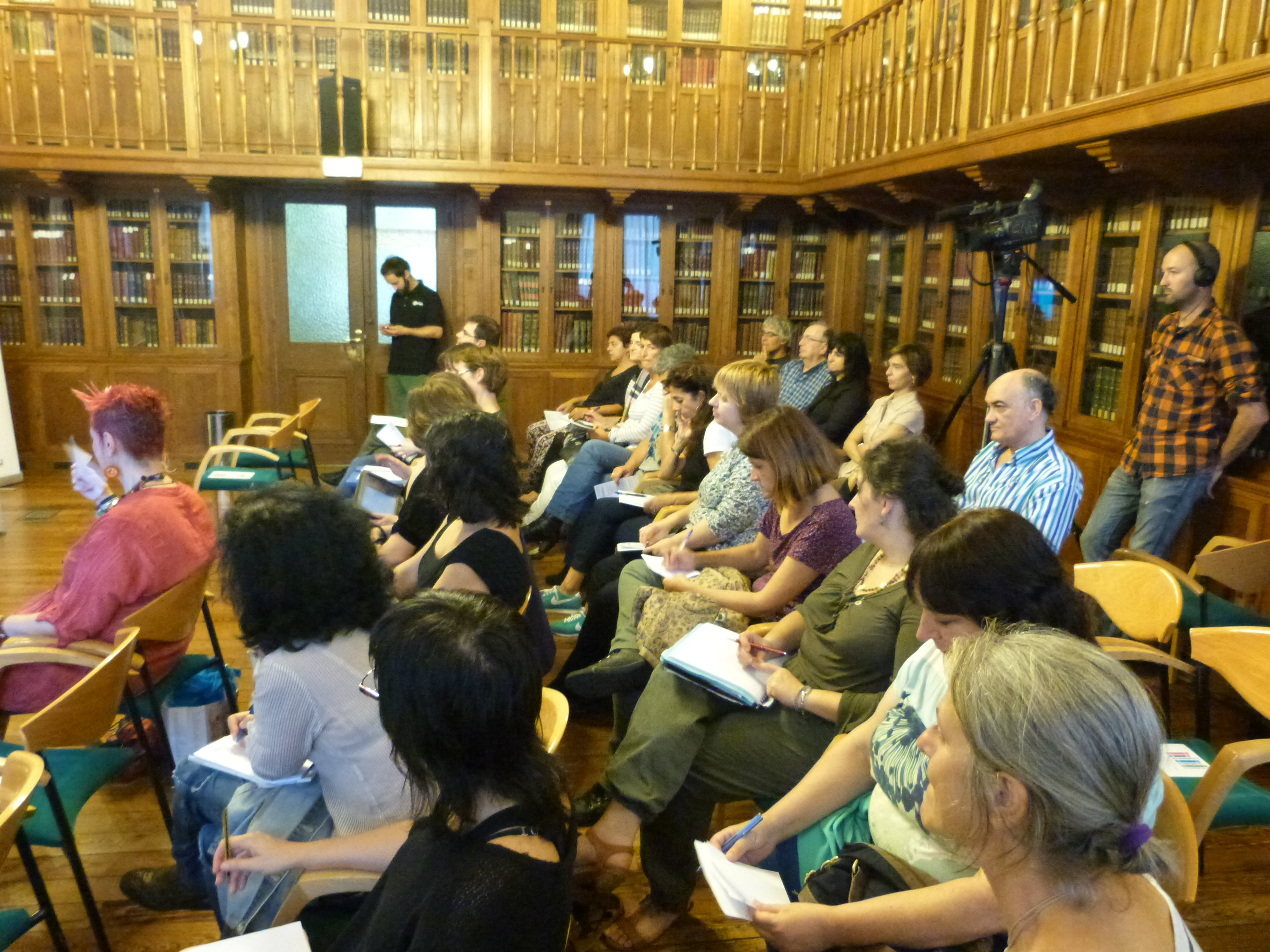 Donostiako Liburutegi Nagusiko Mandas Dukearen aretoa